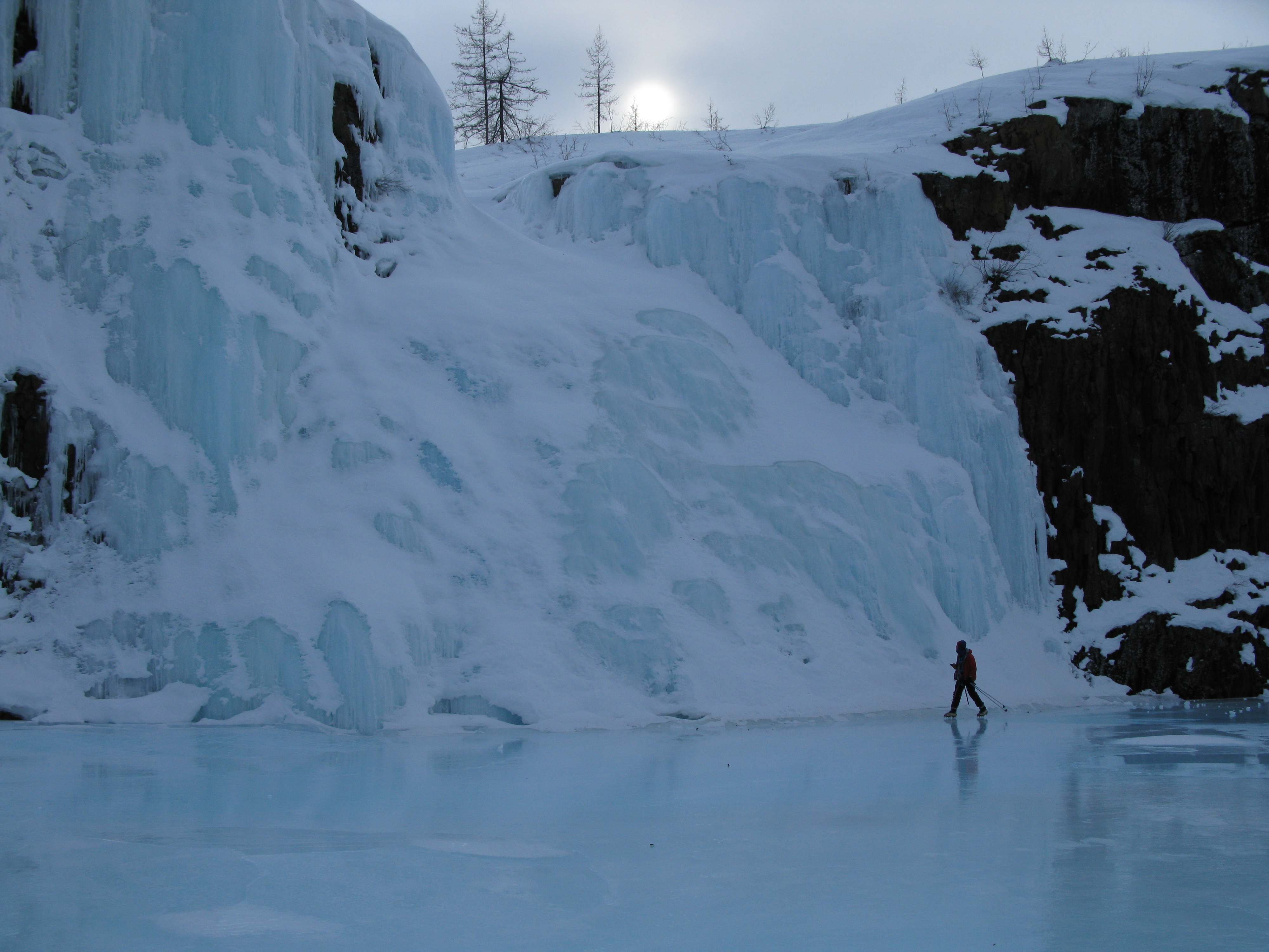 Путоранский заповедник, This image is related to the protected area of Russia number 2400003